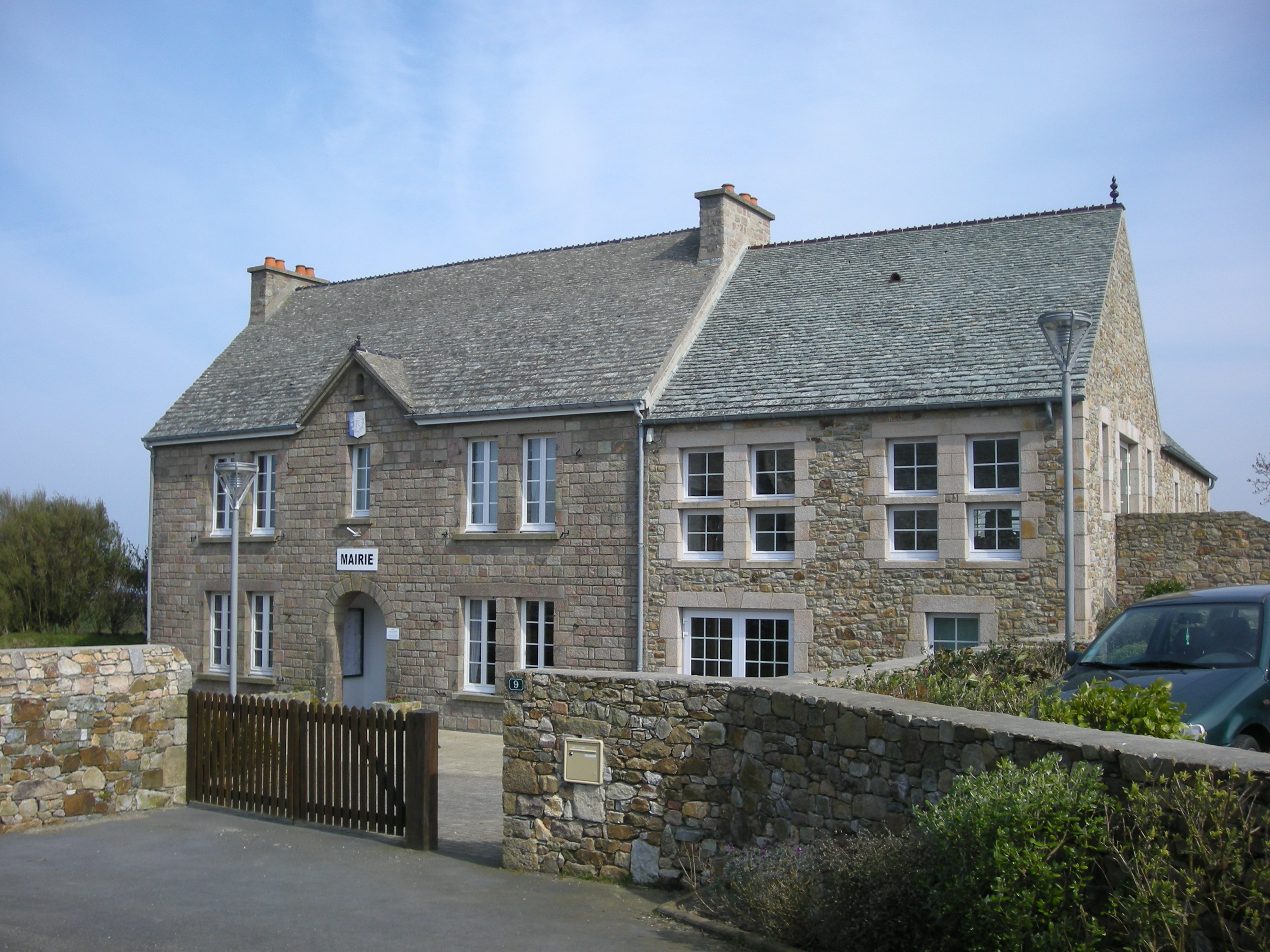 Mairie de Jobourg (Manche, Normandie, France)